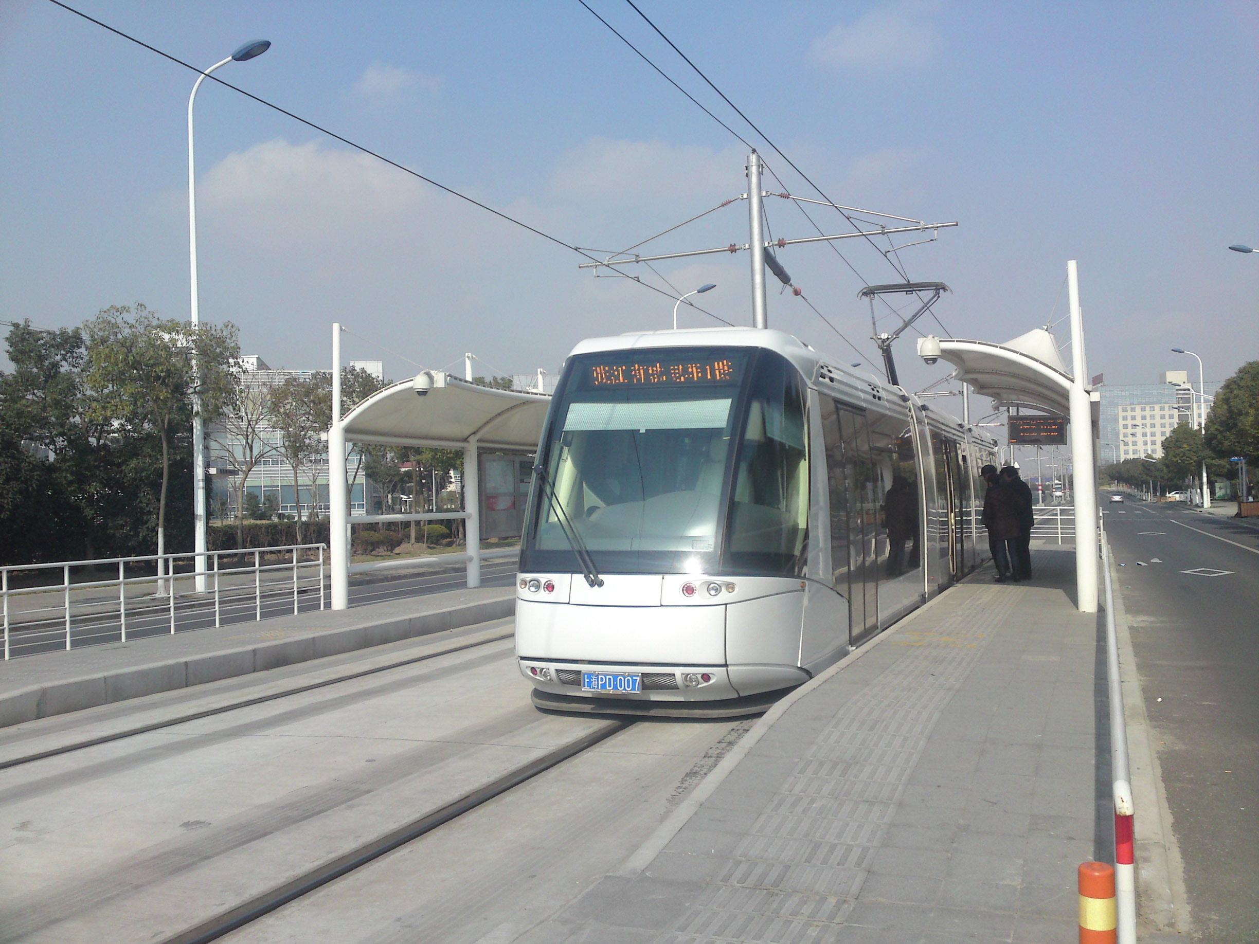 张江有轨电车